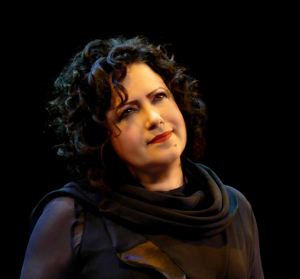 Mosca 20 Maggio 2015 - Moscow International House of Music Foto di scena (Antonella Ruggiero)